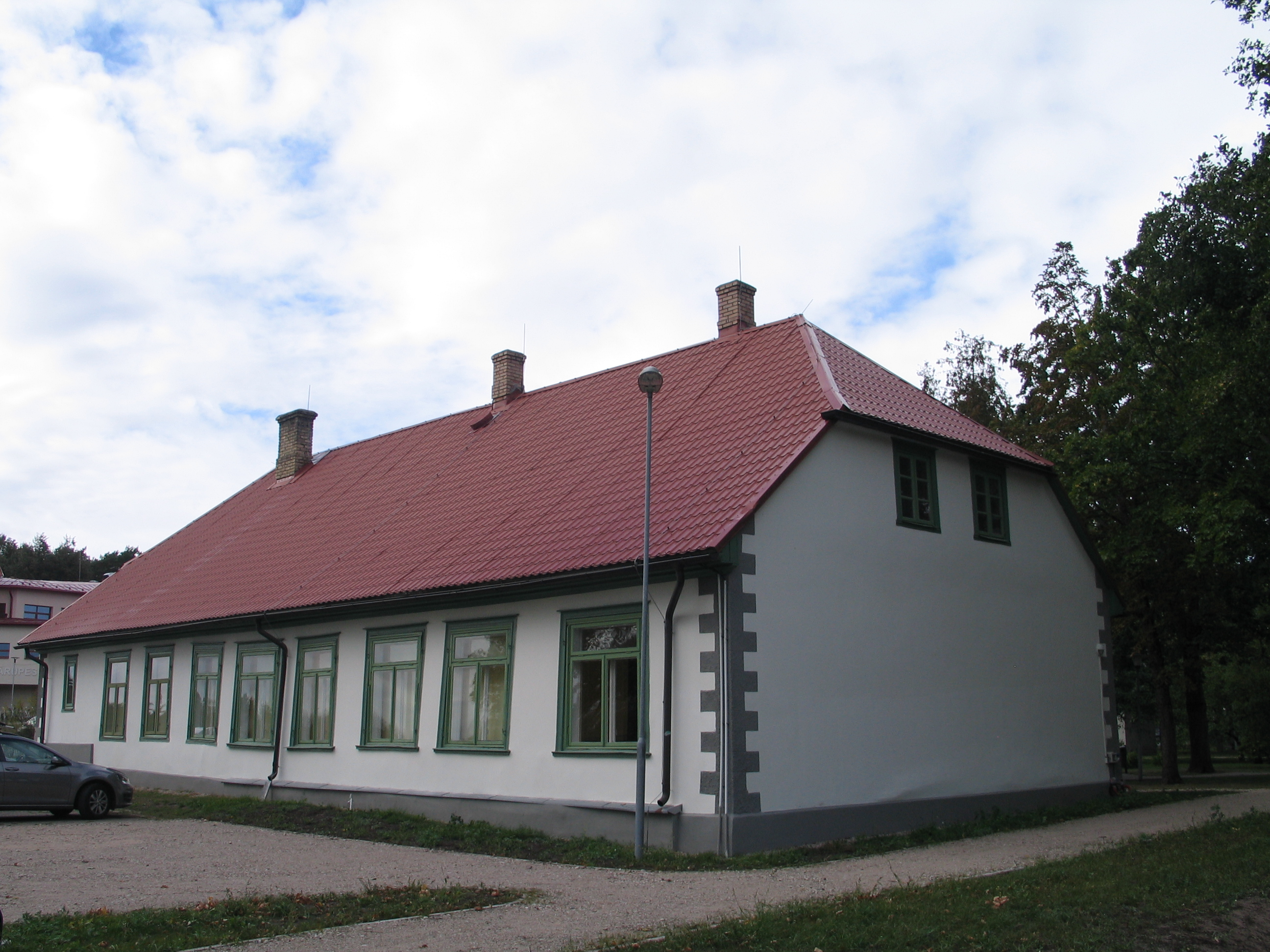 Švarcenieku muiža, tagad Mārupes pašvaldības dienas centrs bērniem un jauniešiem "Švarcenieki"